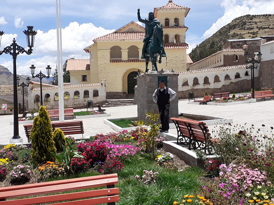 Esta plaza de Surimana es donde inició el primer grito de la Libertad por Don José Gabriel Tupac Amaru Nogura y Micaila Bastidas Phuyuccahua.